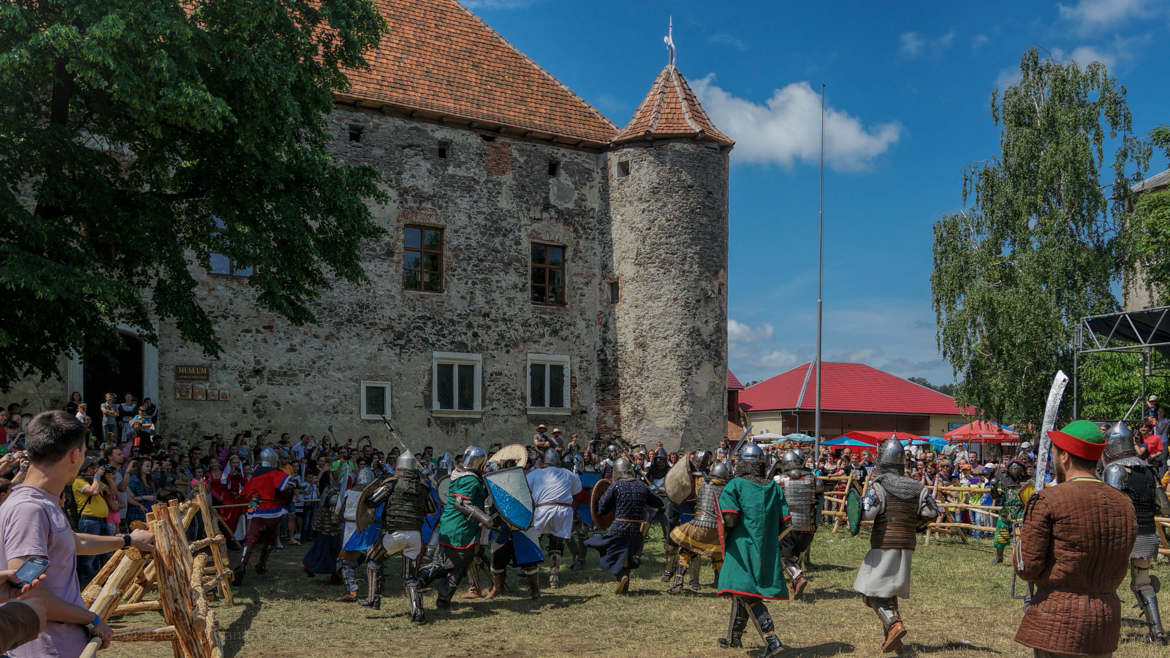 Замок у Чинадійово (мур.), смт. Чинадійово, вул.Волошина,54